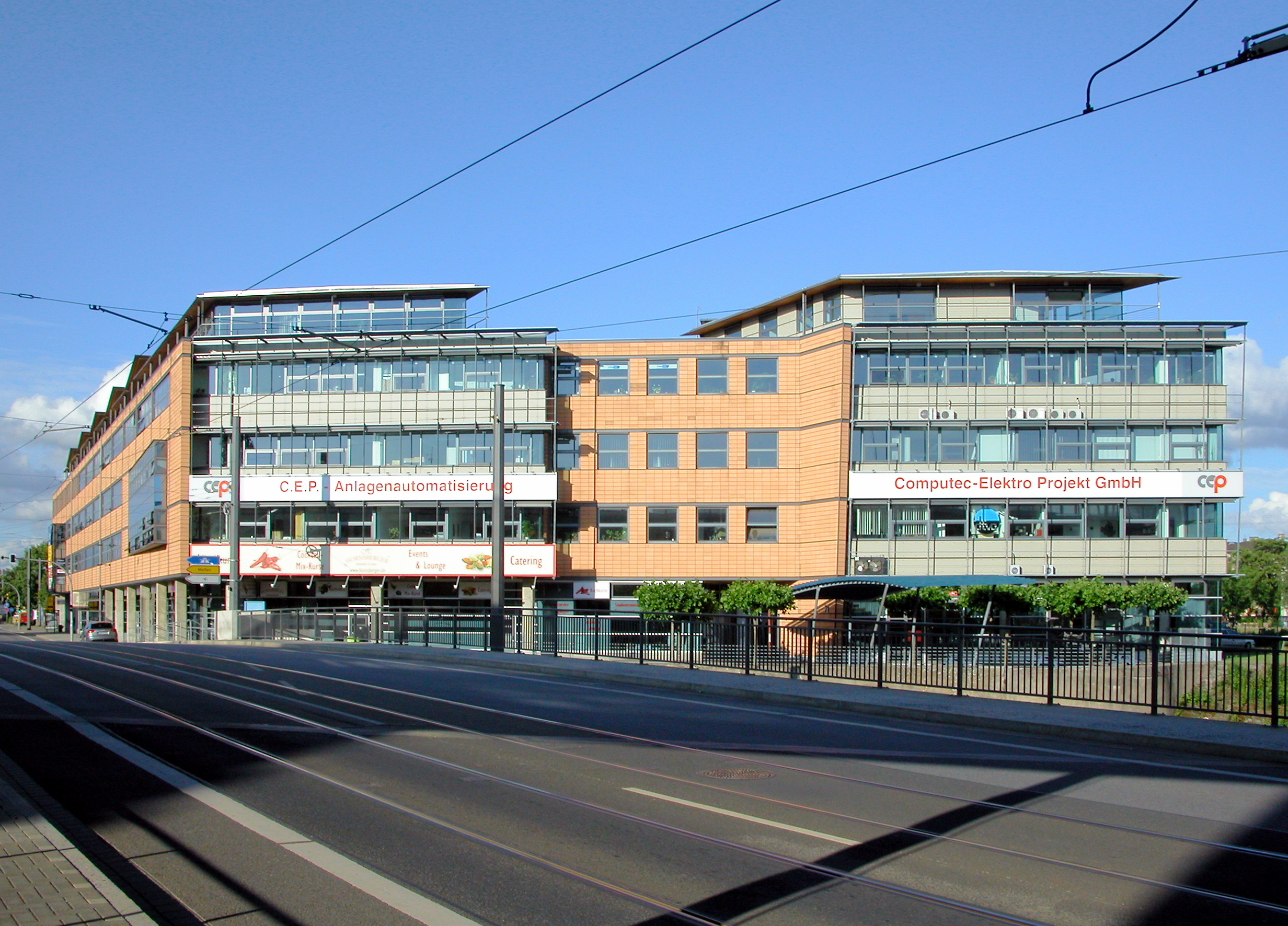 09.06.2009 01159 Dresden Löbtau. Büro- und Gewerbekomplex Löbtauer Straße 67, 69, 71; hier Nr. 71 an der Weißeritz: C.E.P. Anlagenautomatisierung Computec-Elektro Projekt GmbH (GMP: 51.045338,13.706644) [DSCN37869.TIF]20090609055DR.JPG(c)Blobelt